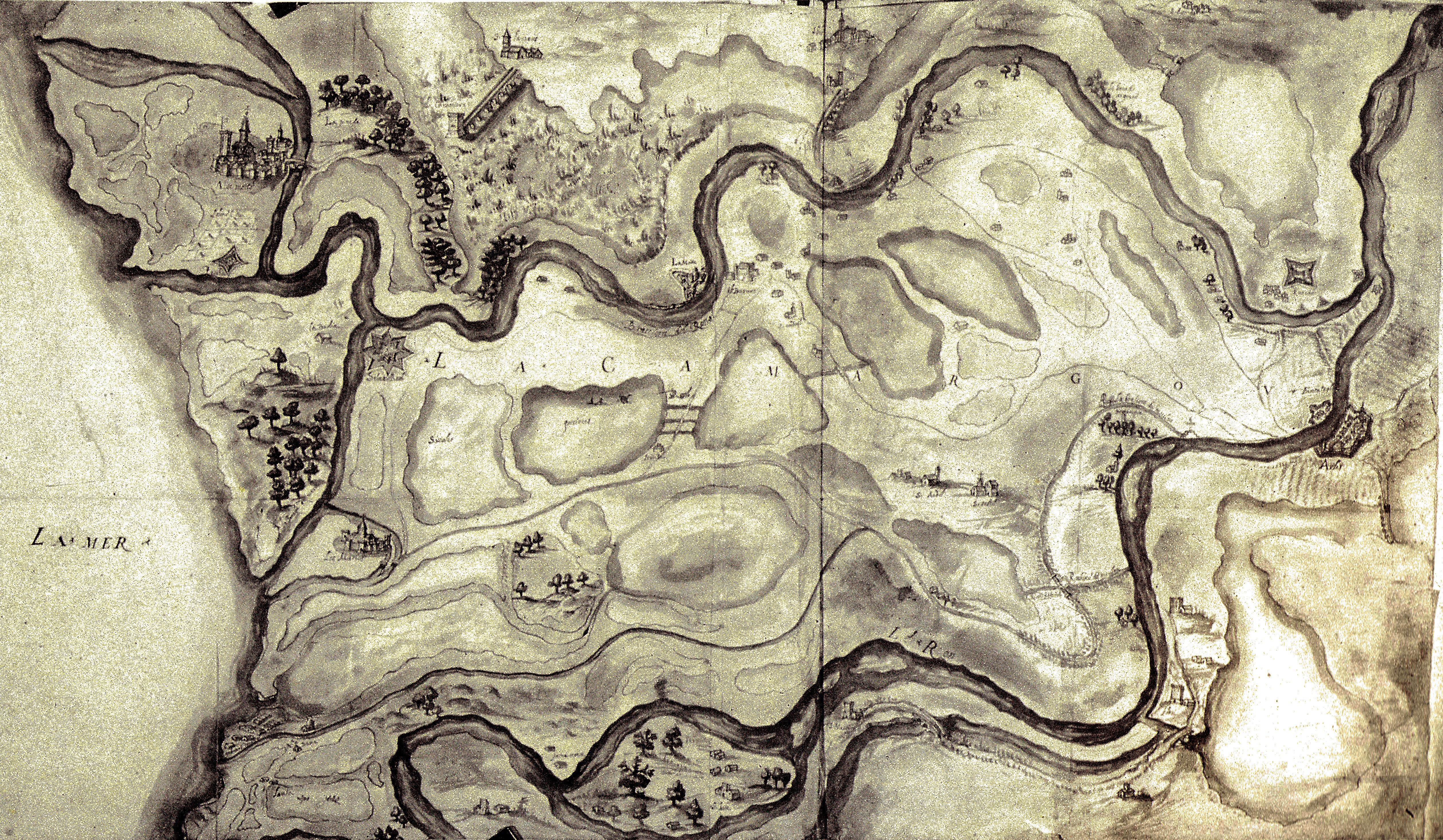 Plan de la Camargue utilisé par les troupes du duché de Savoie sous la Ligue 1590 1595